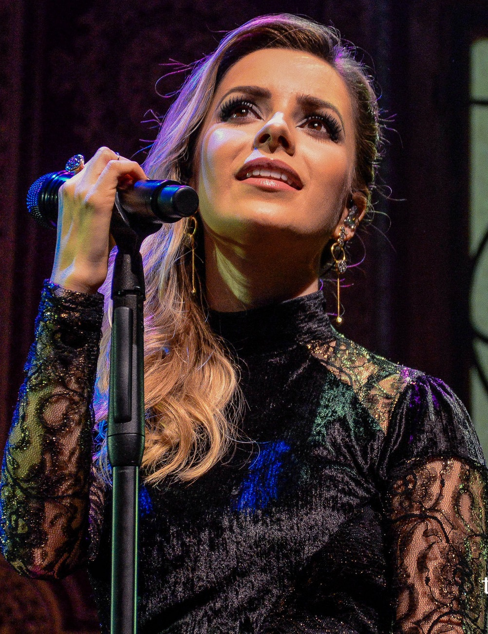 Sandy se apresentando com a turnê Meu Canto na casa de shows Tom Brasil, em São Paulo - 2 de junho de 2017.